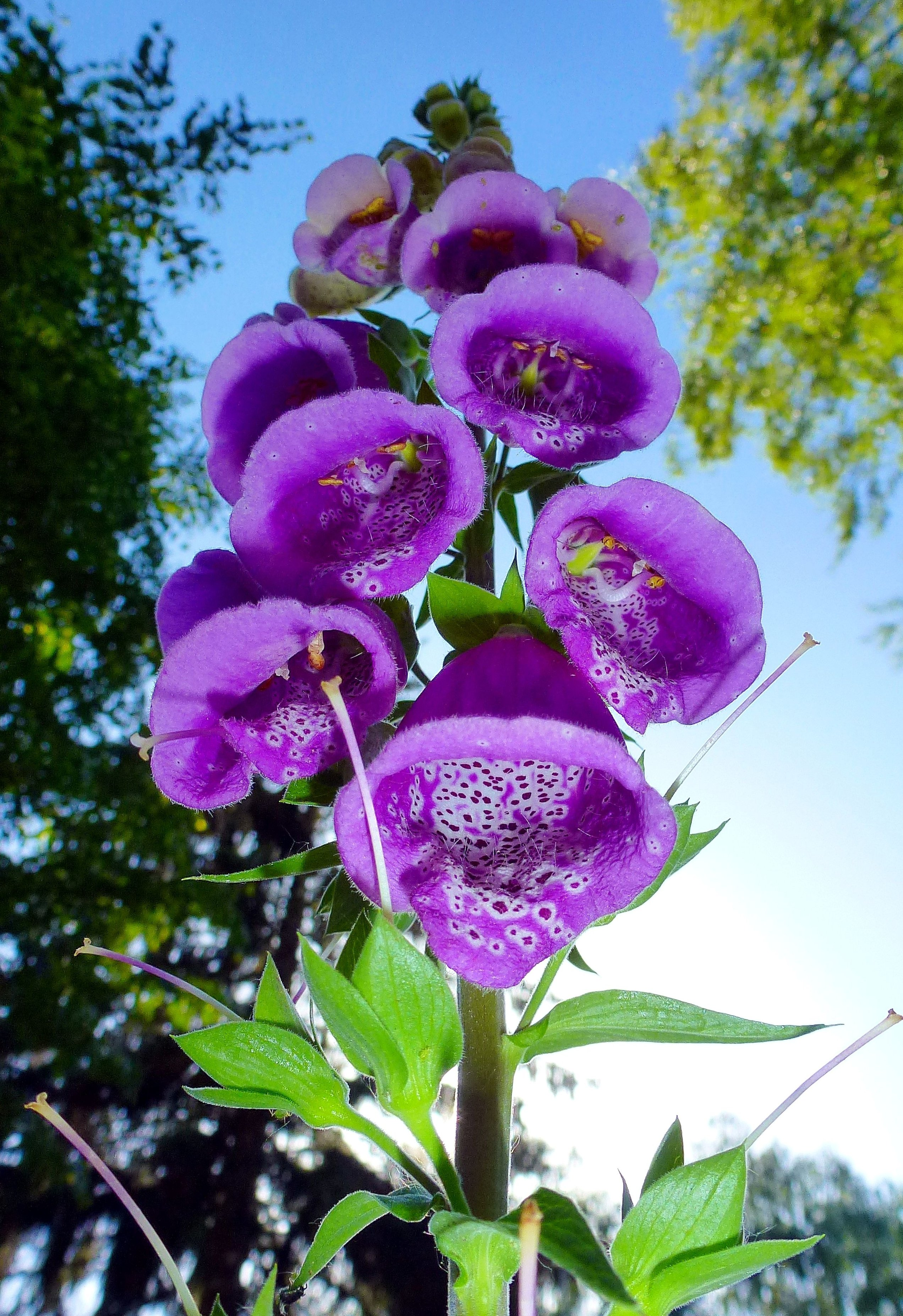 Digitalis purpurea - Roter Fingerhut